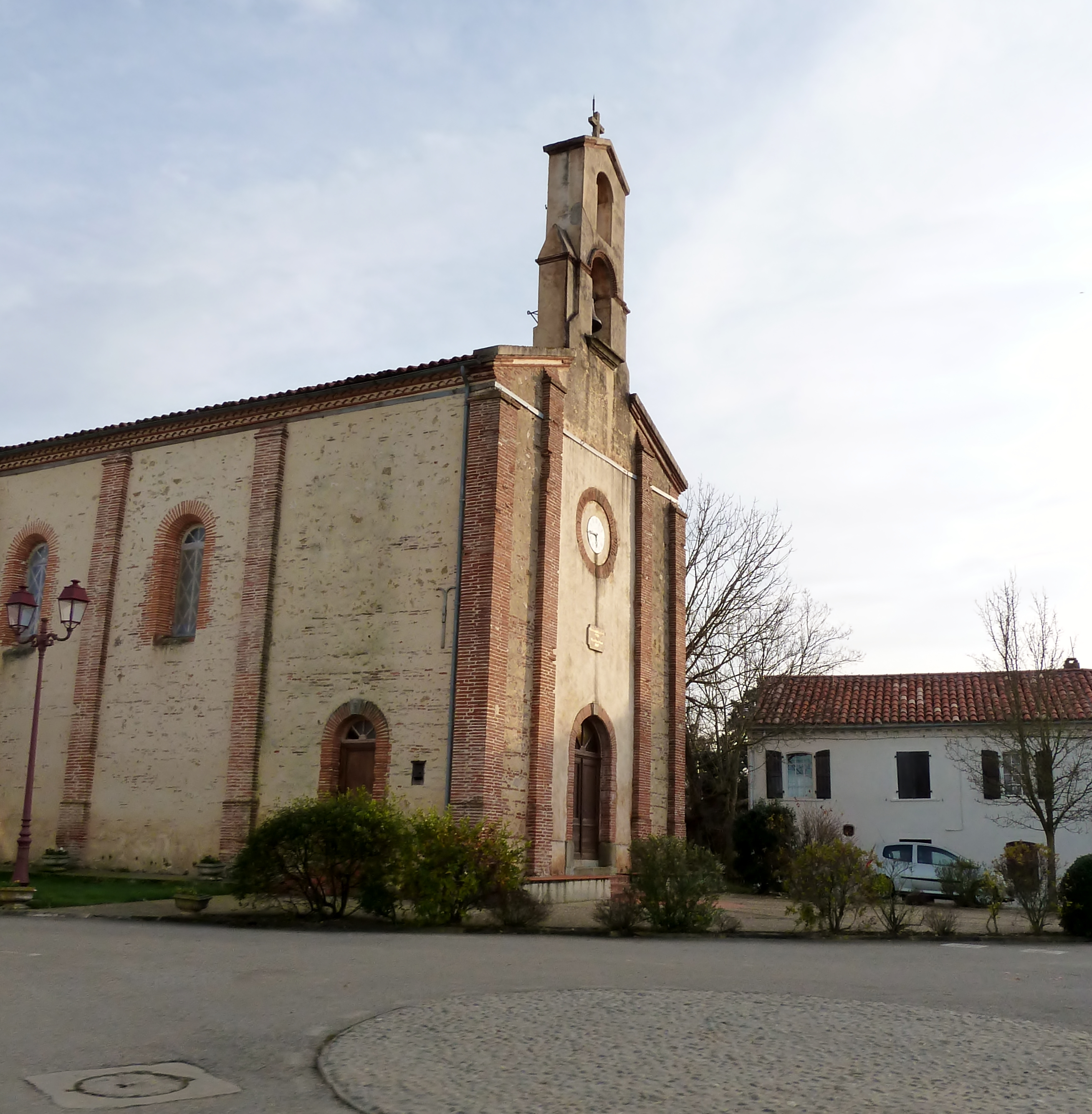 Eglise de Saint-Michel (Ariège)